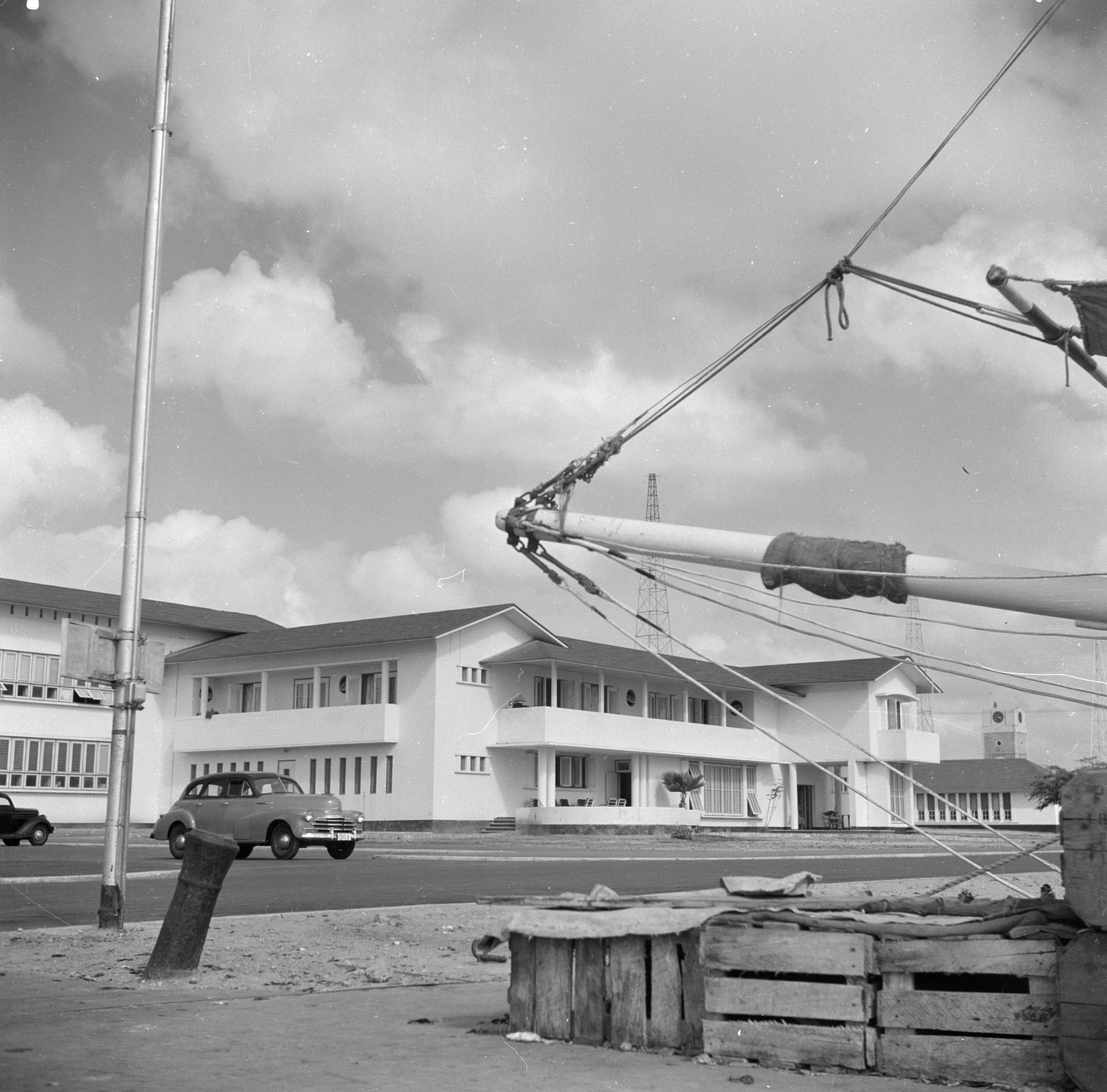 Collectie / Archief : Fotocollectie Van de Poll Reportage / Serie : Reis naar Suriname en de Nederlandse Antillen Beschrijving : Het Gouvernementslogeergebouw in Oranjestad op Aruba Datum : 1947 Locatie : Aruba, Oranjestad Trefwoorden : hotels Fotograaf : Poll, Willem van de, [onbekend] Auteursrechthebbende : Nationaal Archief Materiaalsoort : Negatief (zwart/wit) Nummer archiefinventaris : bekijk toegang 2.24.14.02 Bestanddeelnummer : 252-7882